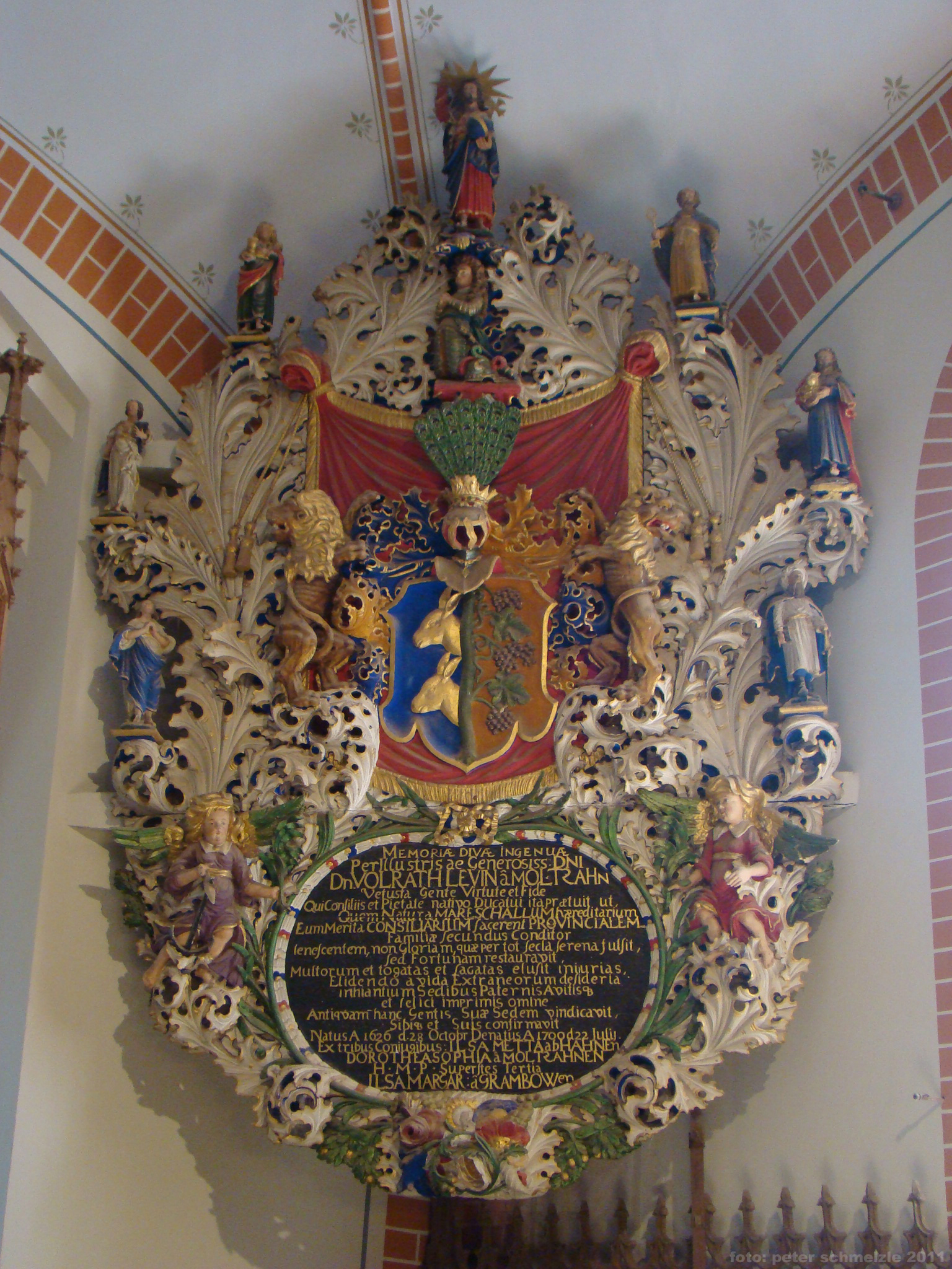 Dorfkirche in Kirch Grubenhagen, Moltzan-Epitaph im Chor. Foto: Peter Schmelzle, August 2011.